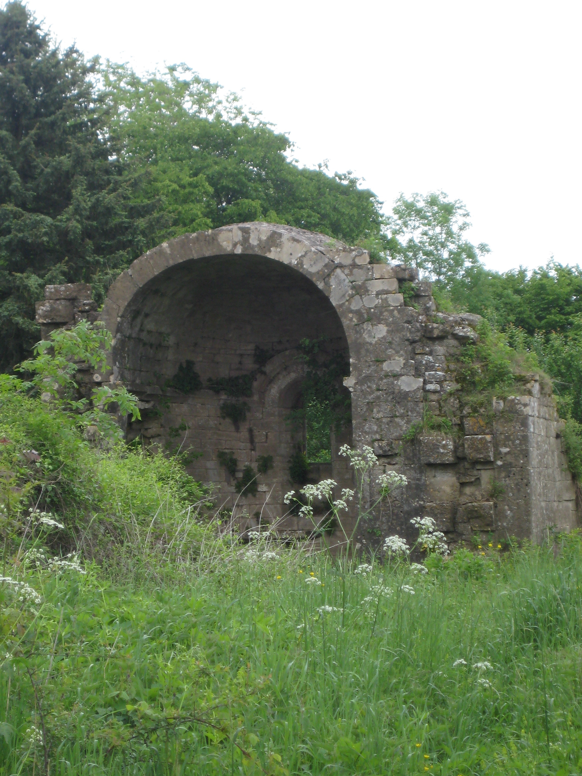 Description Prieuré SancyDate 16 May 2009Source mon appareil photoAuthor Aimelaime Prieuré Sancy